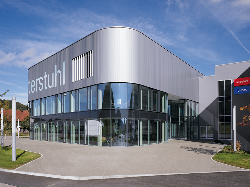 Interstuhl Arena am Hauptstandort in Tieringen